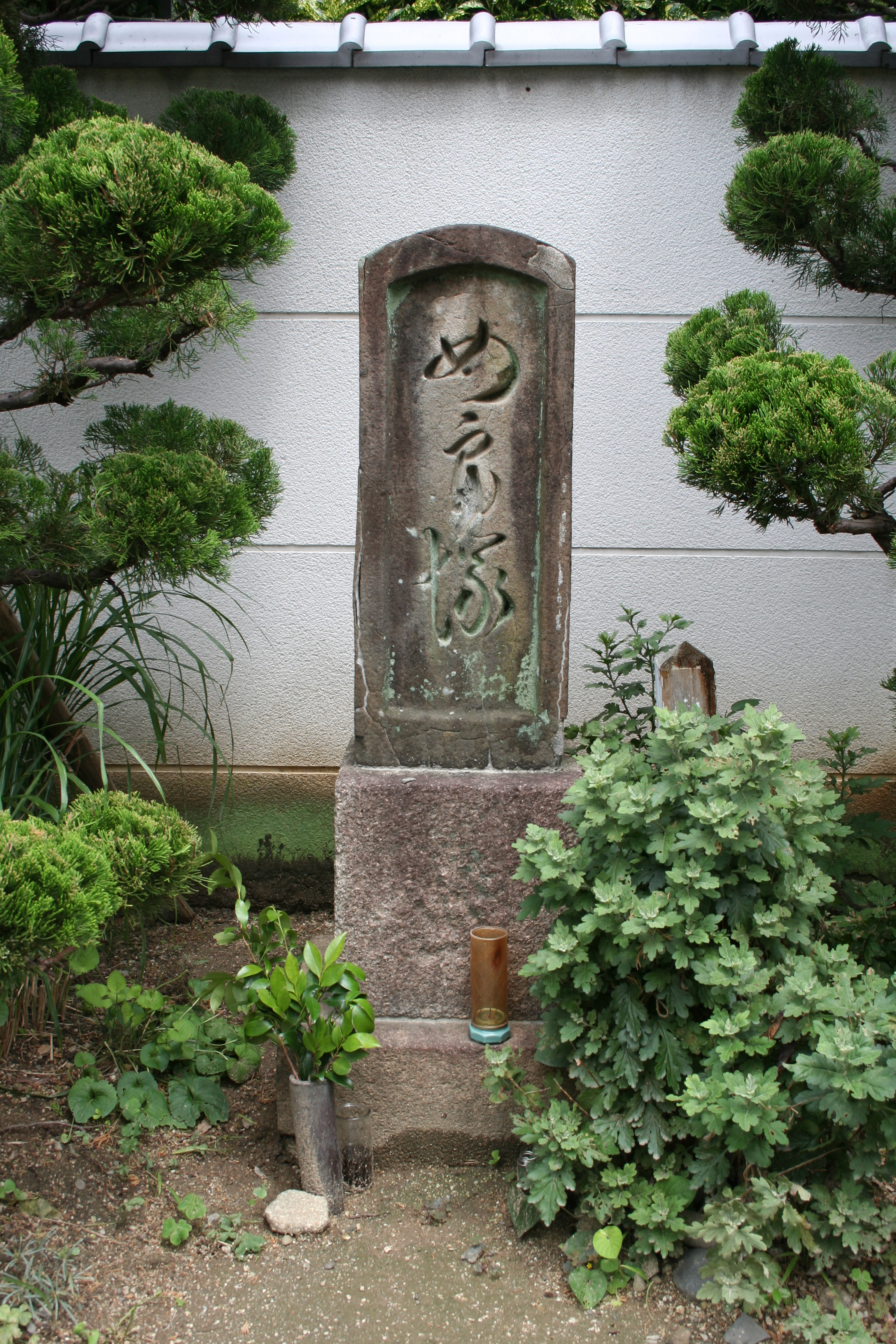 墨染寺（兵庫県伊丹市） 女房塚